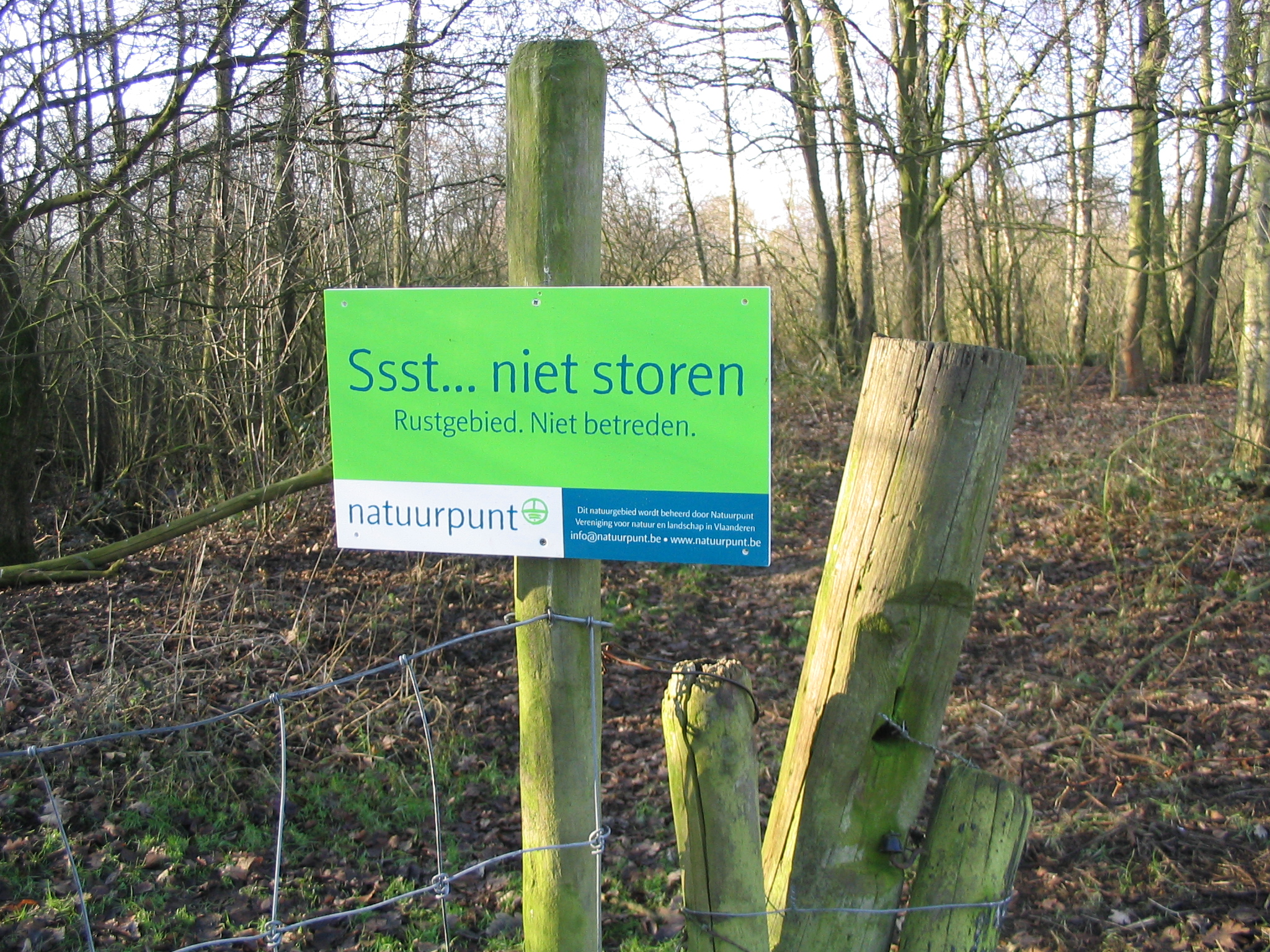 foto genomen door mezelf aan de zij-ingang van het natuurgebied Panneweel